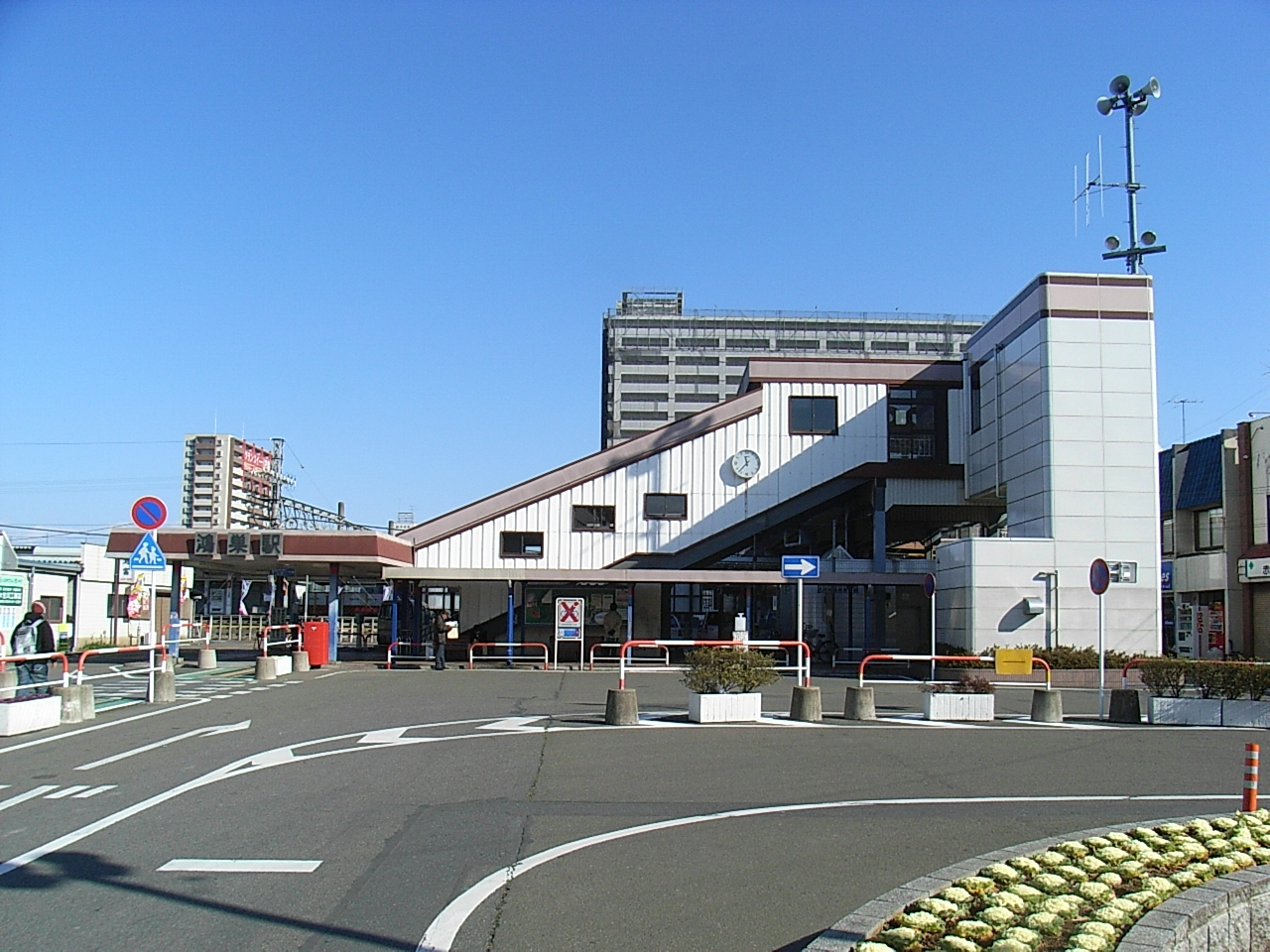 Konosu Station (West Entrance) on JR Takasaki Line. (1-1-1,Honcho,Konosu-shi,Saitama-ken,JAPAN)